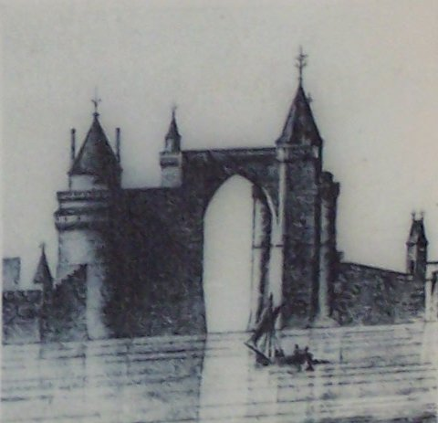 Photographie d'une illustration réalisée par Juste Lisch en 1864 et qui représente, selon lui, ce qu'était l'arche reliant les deux tours du Vieux-Port de La Rochelle.